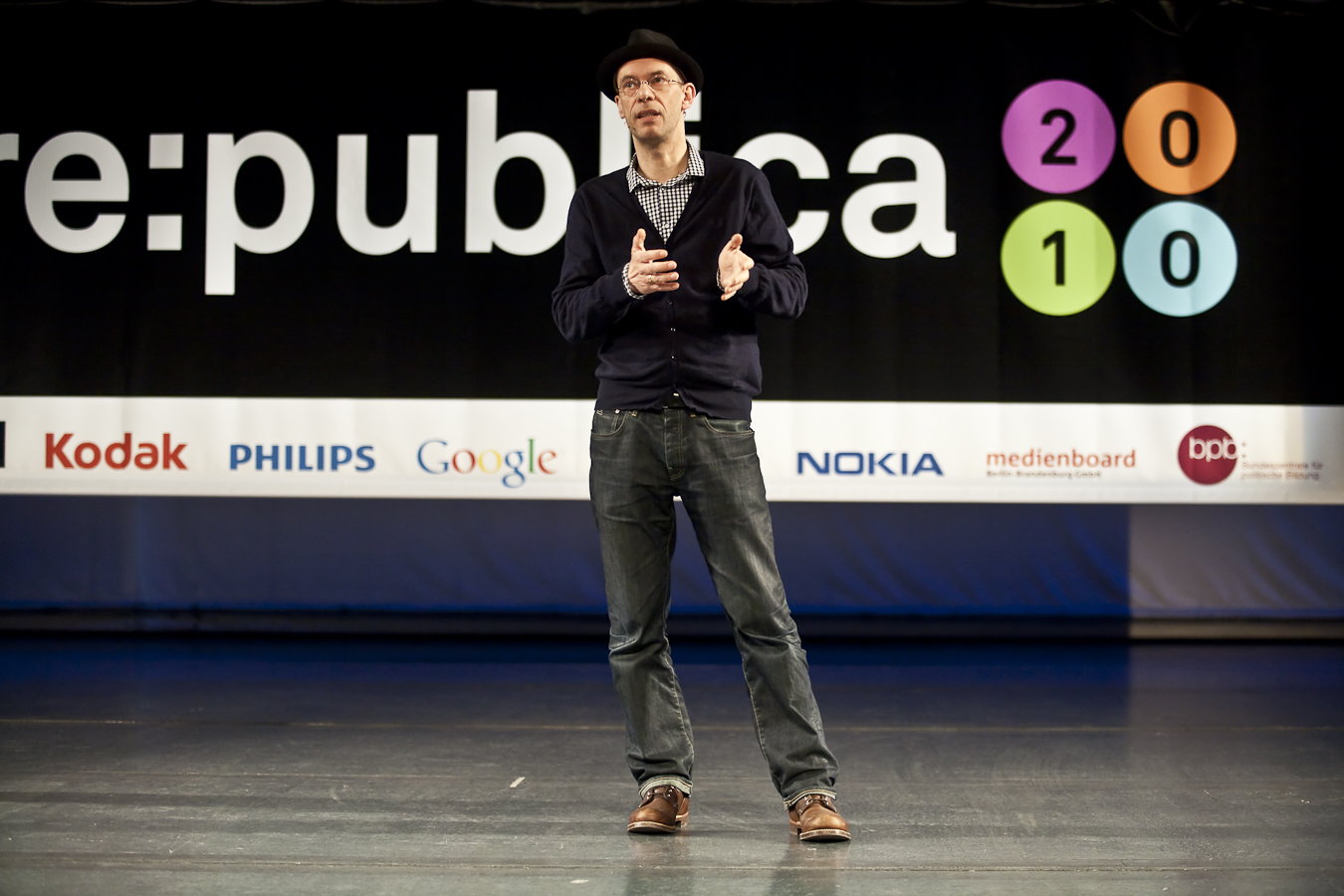 Johnny Haeusler auf der re:publica. Photo by Daniel Seiffert